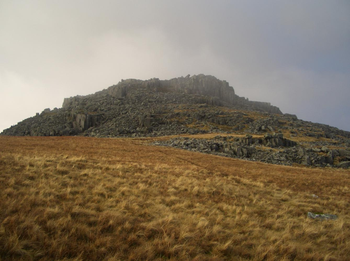 Bera Mawr